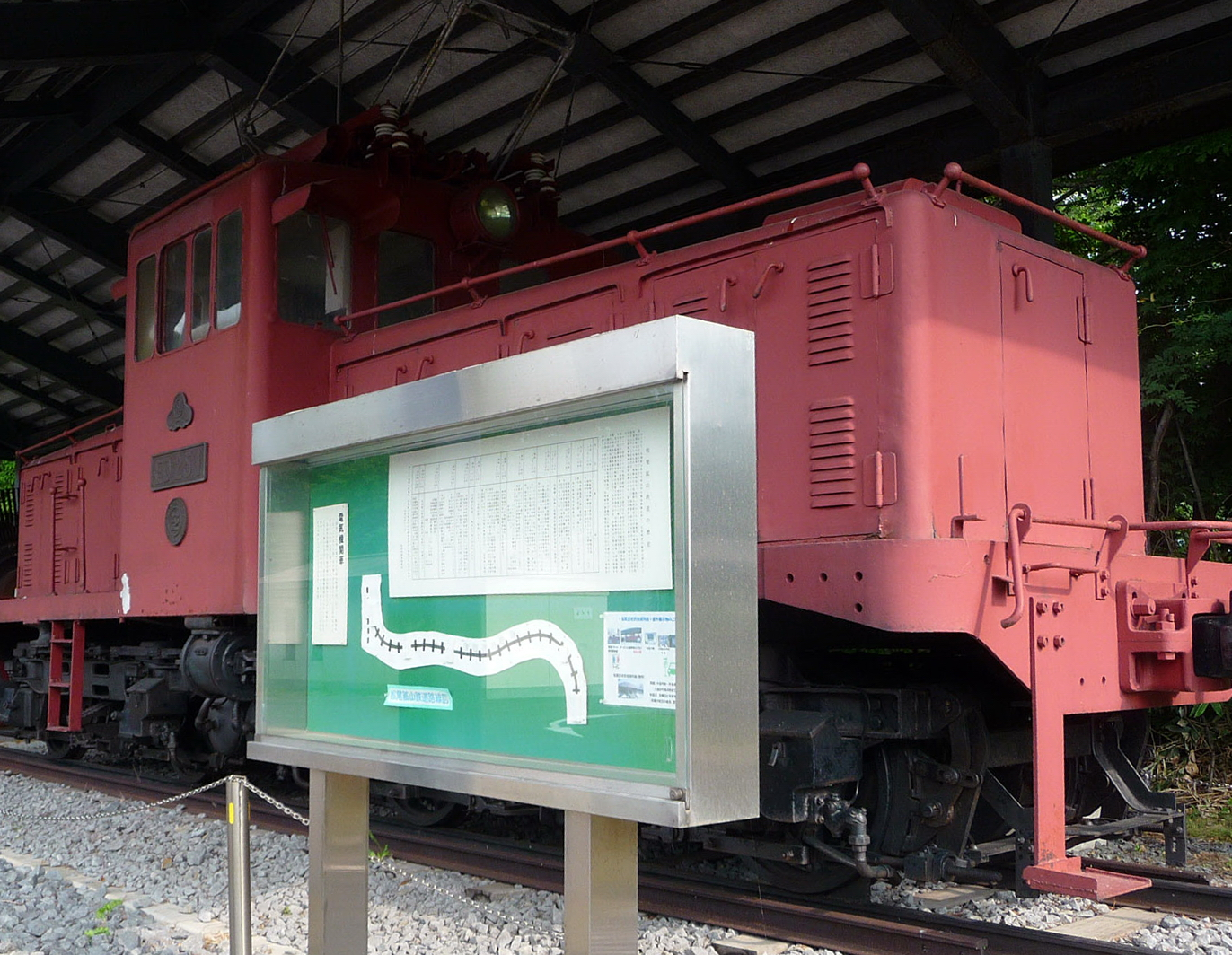 松尾鉱業鉄道ED25形電気機関車 ED251